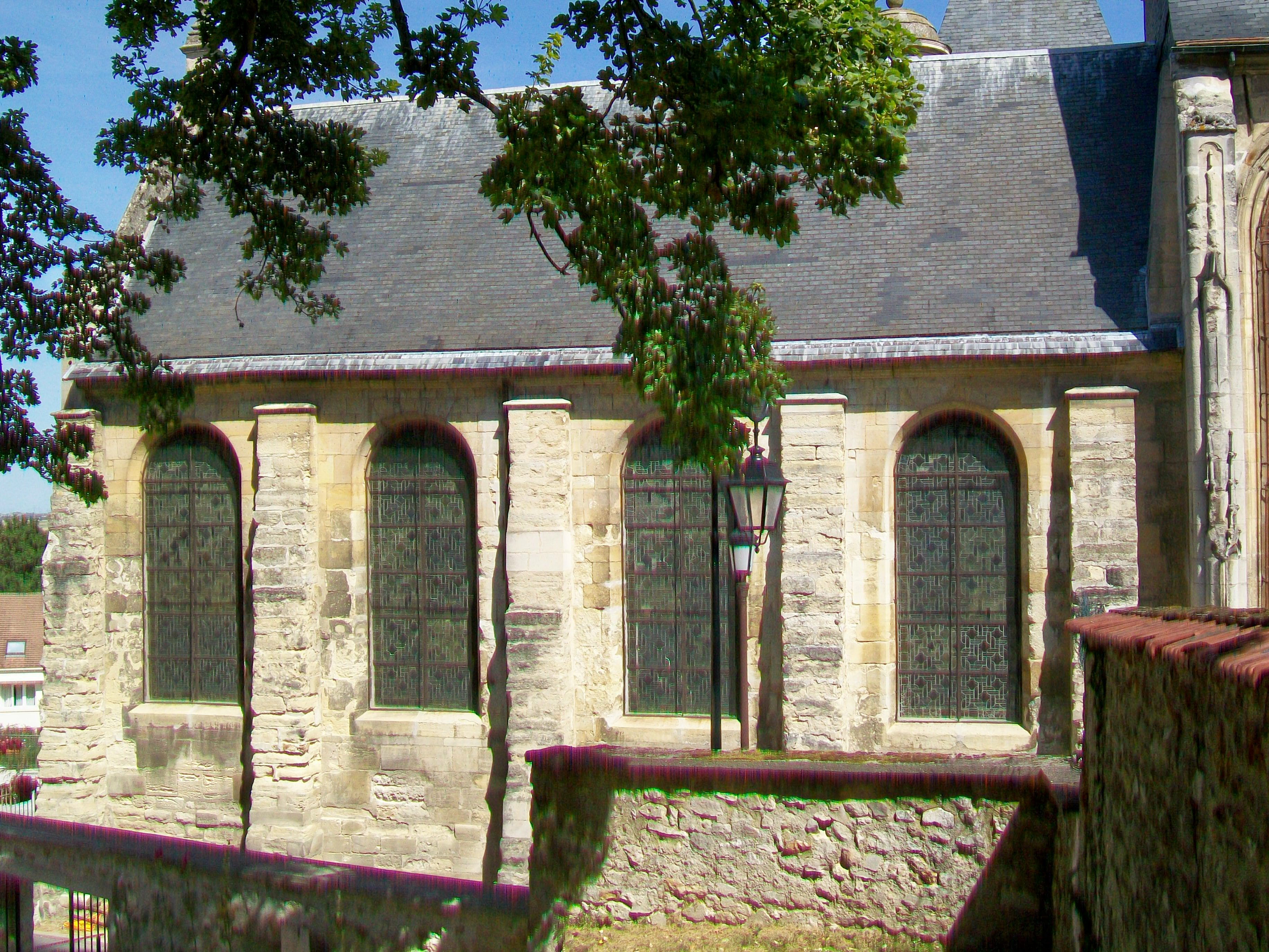 Vue de la nef depuis le sud.